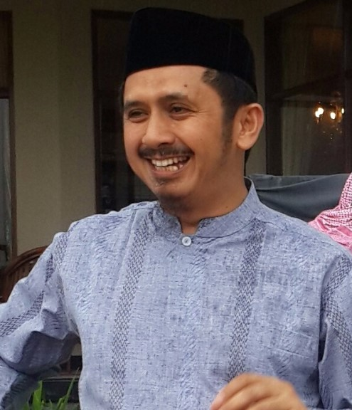 Muhammad Zaitun Rasmin